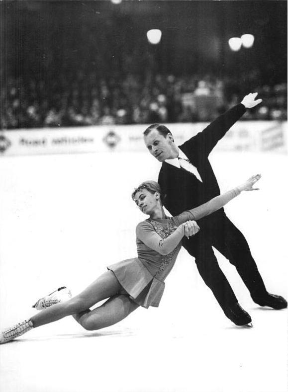 Ludmilla Beloussowa, Oleg Protopopow Zentralbild Thieme 13.3.1968 Zum internationalen Schaulaufen der ISU. So, wie in der Karl-Marx-Städter Eissporthalle VIII. Parlament am 11.3.1968 (Foto) die Olympiasieger, Welt- und Europameister im Paarlaufen Ludmilla Beloussowa-Oleg Protopopow (UdSSR) stürmisch gefeiert wurden, werden sie auch in der Dynamo-Eishalle am 13.3.1968 das Berliner Publikum erneut begeistern.